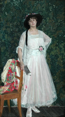 М.Троянова - ДРАМАТИЧЕСКАЯ АКТРИСА В МИНСКОМ ХУДОЖЕСТВЕННОМ МУЗЕЕ